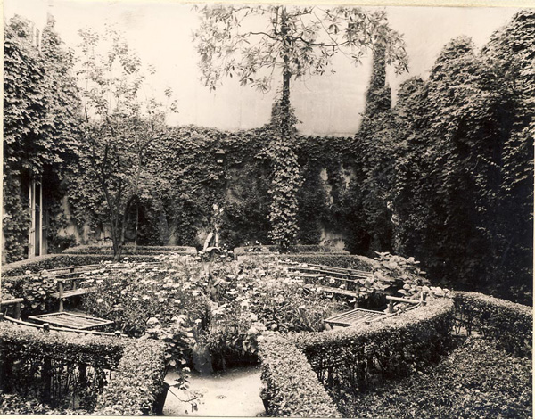 Vista del jardín del Museo Romántico en 1950.